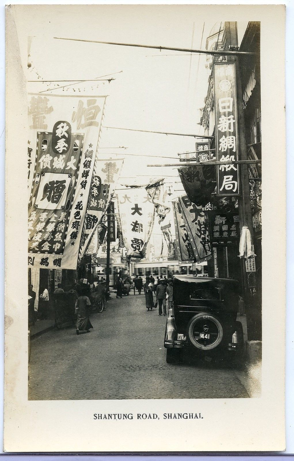 上海山东路旧照